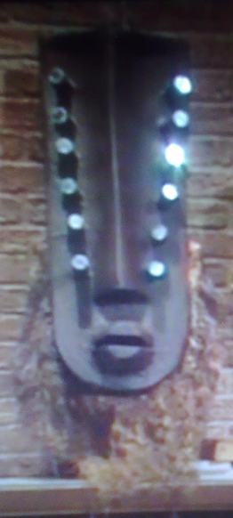 Foto van het masker met de 1000 ogen